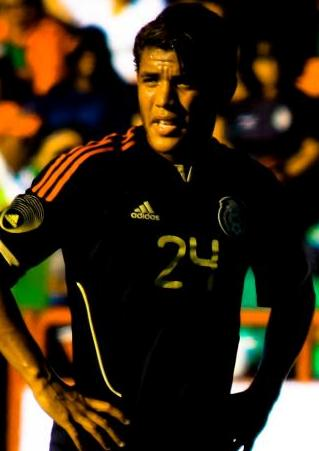 Mexico vs independiente de Medellin, partido de la seleccion mexicana jugado en el estadio Caliente de Tijuana, mas info videos y fotos en